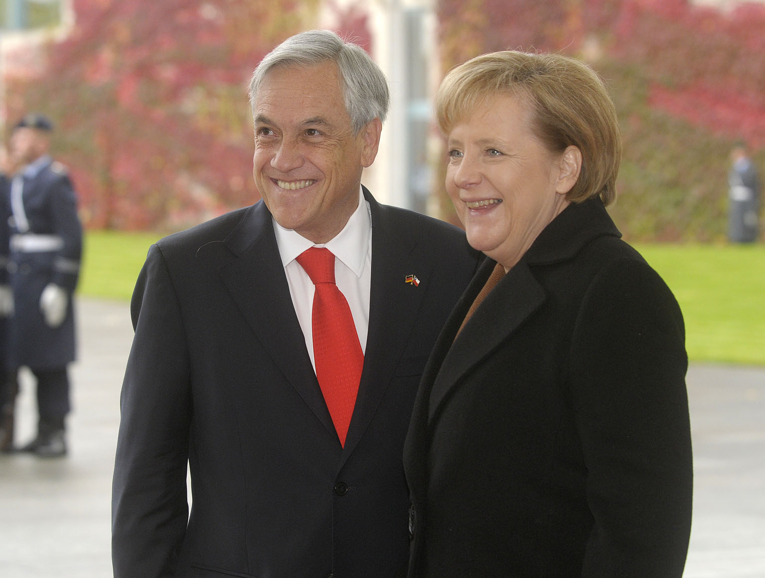 Reunión con Angela Merkel